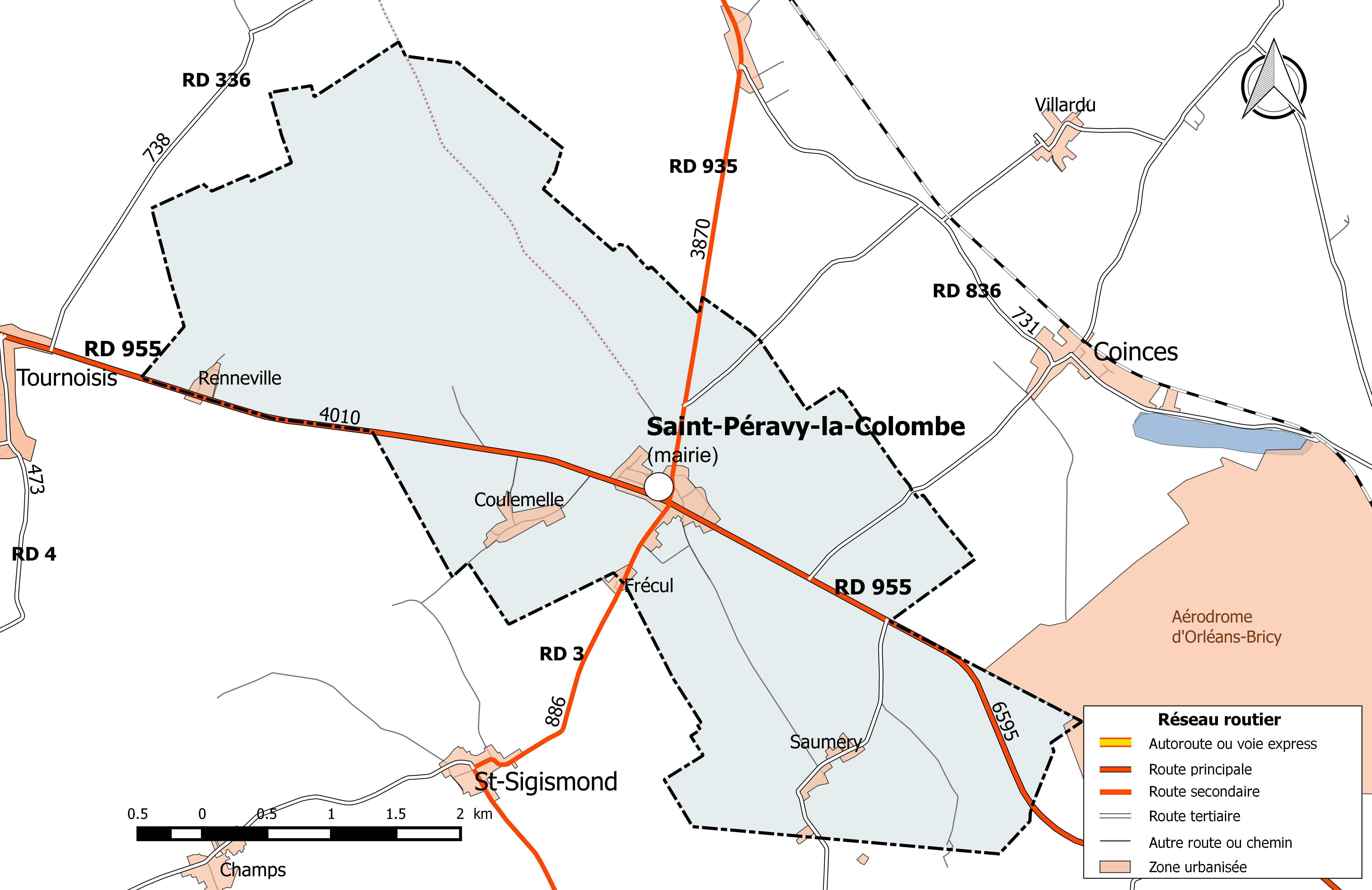 Carte du réseau routier de la commune de Saint-Péravy-la-Colombe.